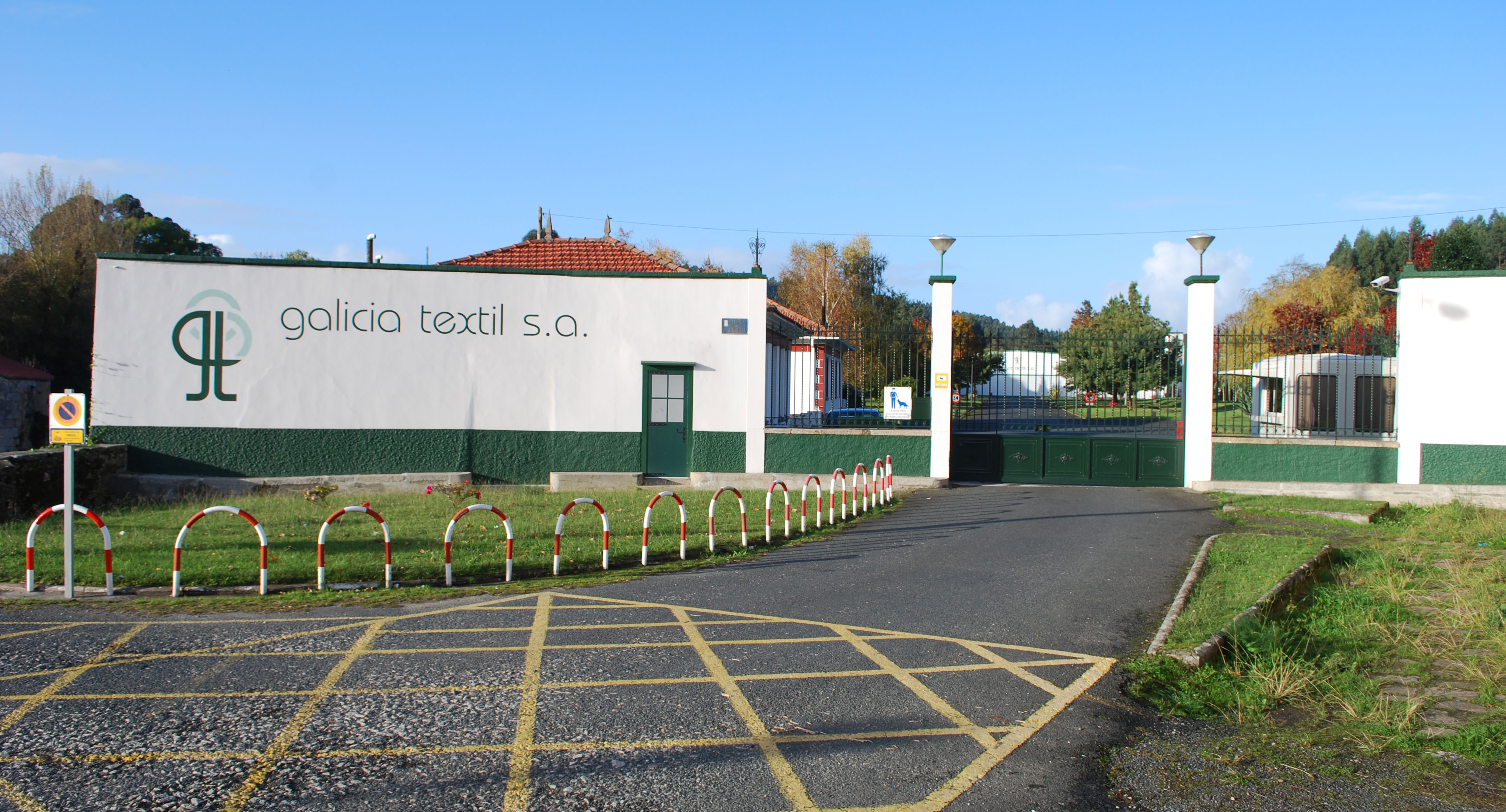 Porta de acceso a Galicia Textil SA Neda Xuvia A Coruña Galiza Spain